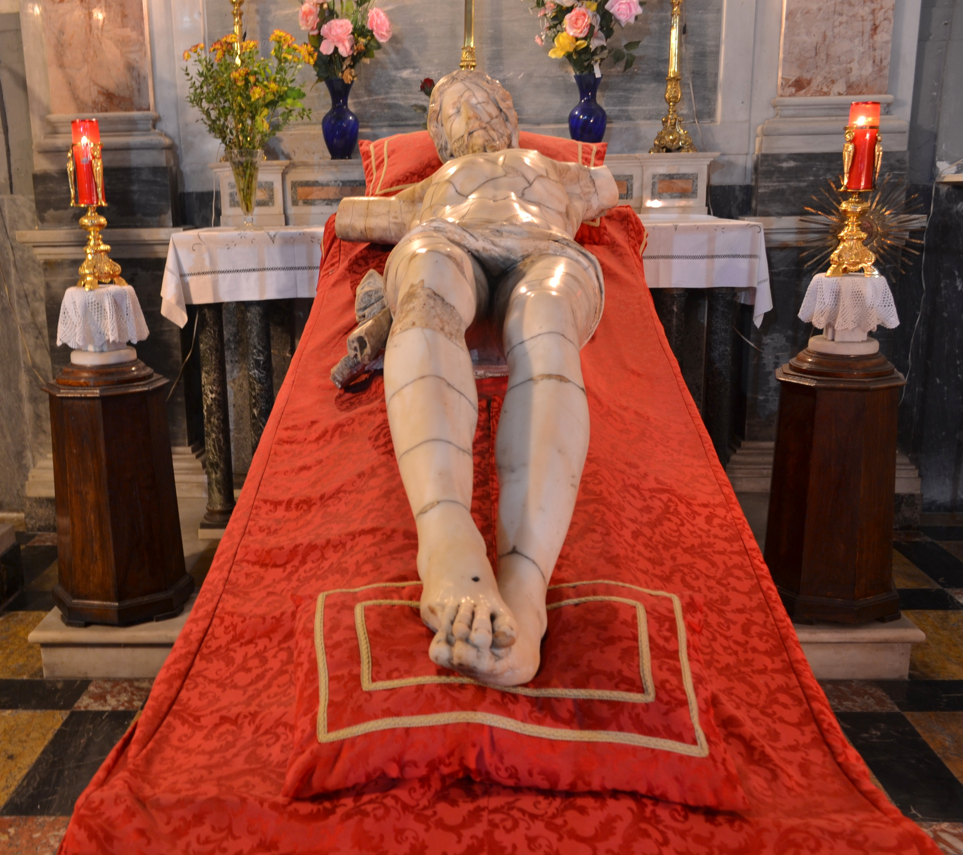 Il Crocifisso di Michelangelo Naccherino, anno 1599, proviene dalla Basilica dello Spirito Santo. Durante un incendio del 1923, la scultura si staccò dalla parete e precipitò sul suolo, provocando ingenti danni al marmo.